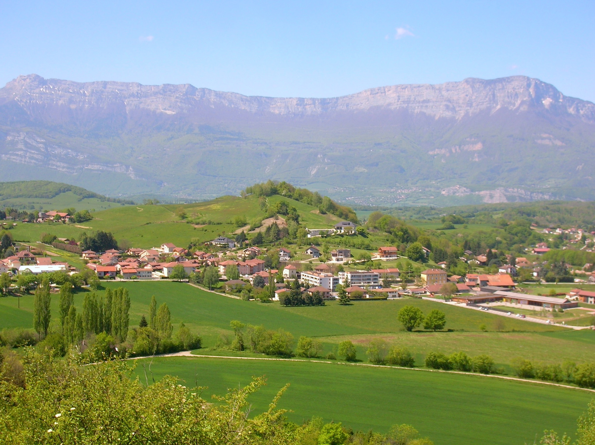 DSCN4673 depuis cretes d'herbeys Sur le chemin des Crêtes d'Herbeys (qui touche les communes de Saint-Martin d'Uriage, Herbeys, Brié-et-Angonnes et Vaulnavey-le-Haut). Isère, Rhone-Alpes, France.